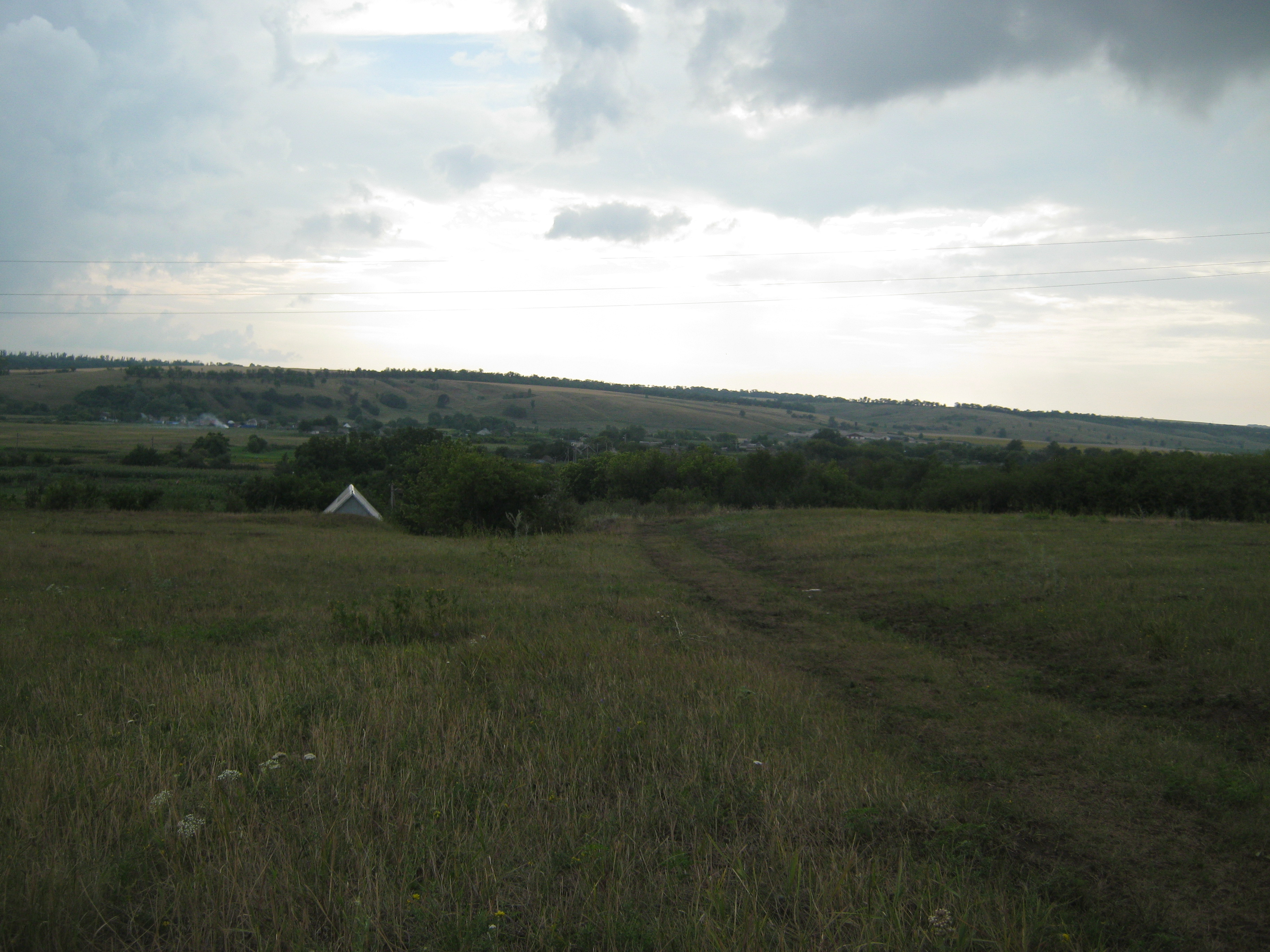 Літо, 5 година